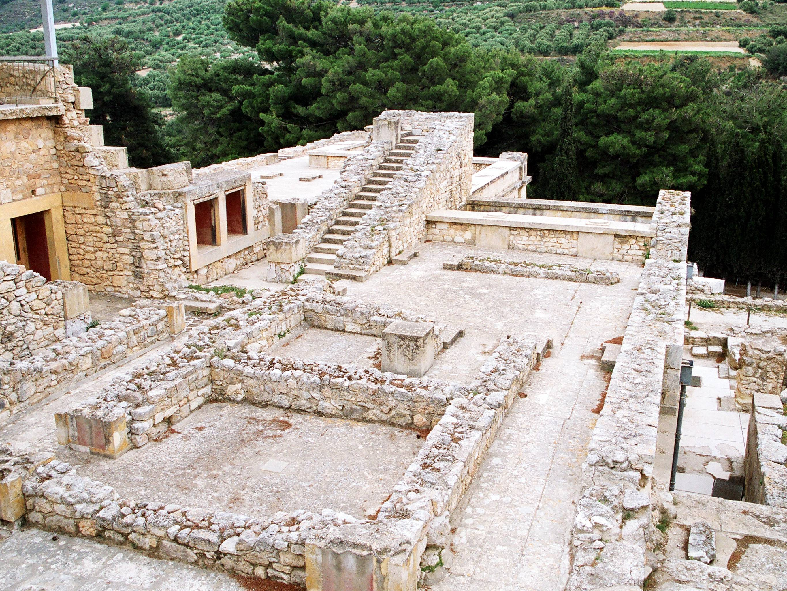 Knossos südlich von Iraklio, Kreta, Griechenland